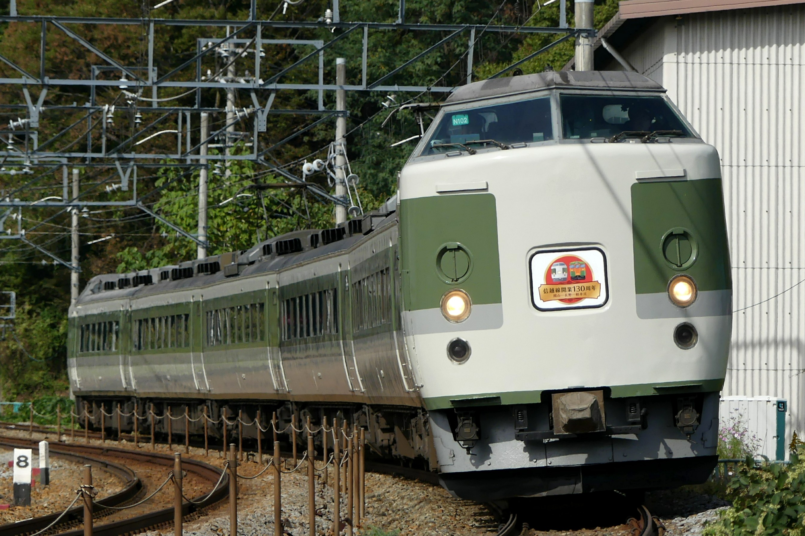 信越本線開通130周年記念号(189系電車)